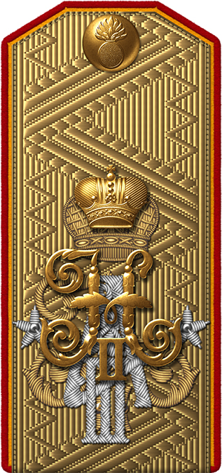 Генерал-майор Свиты Его величества при форме 1-го лейб-гренадерского Екатеринославского Императора Александра II полка, состоявший в шефской роте 20.10.1894. Источник: Плакат из книги: Рисунки наружных отличий воинских чинов и званий 1914 (Рисунки наружныхъ отличiй воинскихъ чиновъ и званiй) В. Х. Казина. — Петроградъ. — 1914. (Издано попечением Ю.Ритчика и А. Снопкова в количестве 1000 экз. — Контакт-Культура. — Москва. — 2004.)